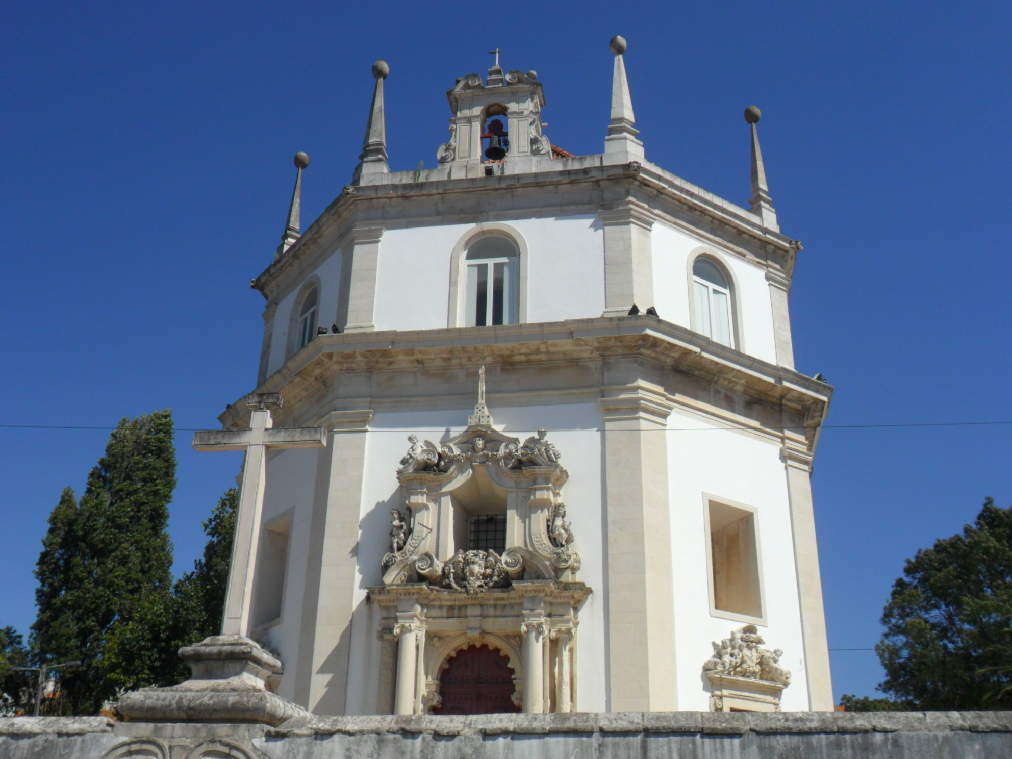 Capela do Senhor das Barrocas, Aveiro